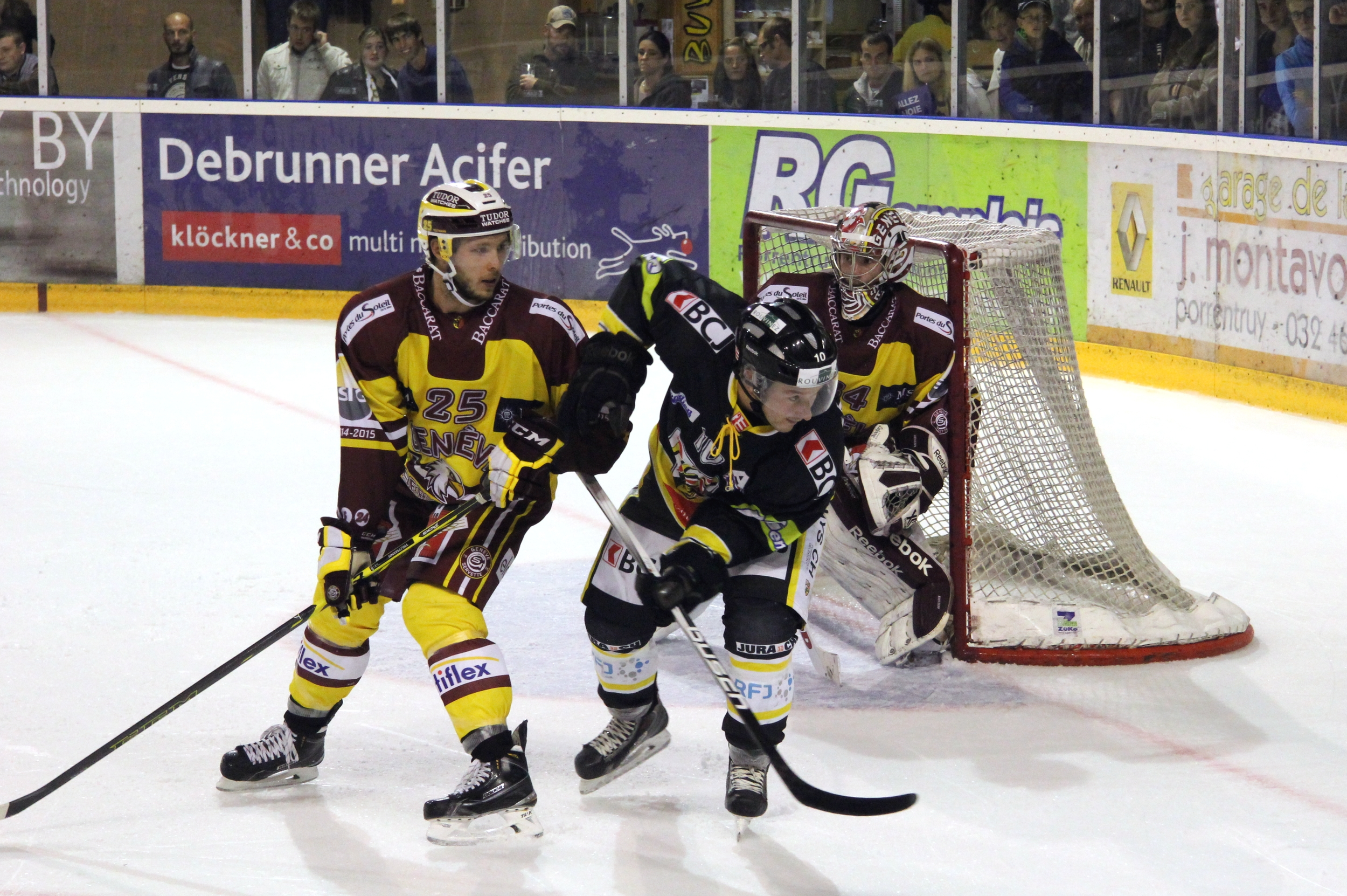 Dario Trutmann (G 25), Steven Barras (A 10), Gauthier Descloux (G 34).